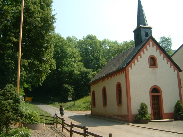 St. Wendel und St. Urban Kirche in Ammeldingen an der Our, (Eifel) erbaut 1816, 1945 erneuert, 1980 neu gestaltet